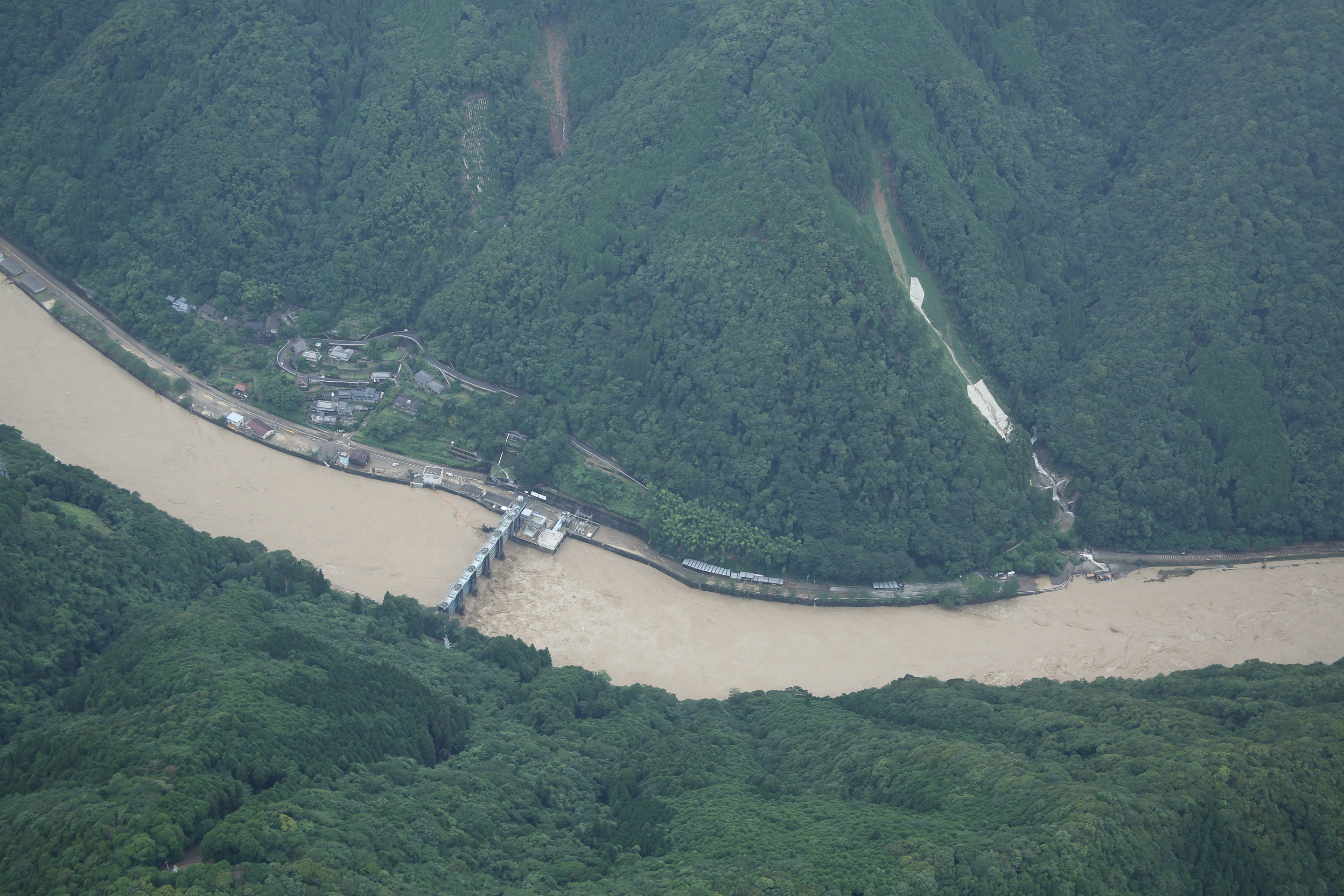 令和2年（2020年）7月3日からの大雨を受けて国土地理院によって行われた現地調査で撮影された空撮写真[1]